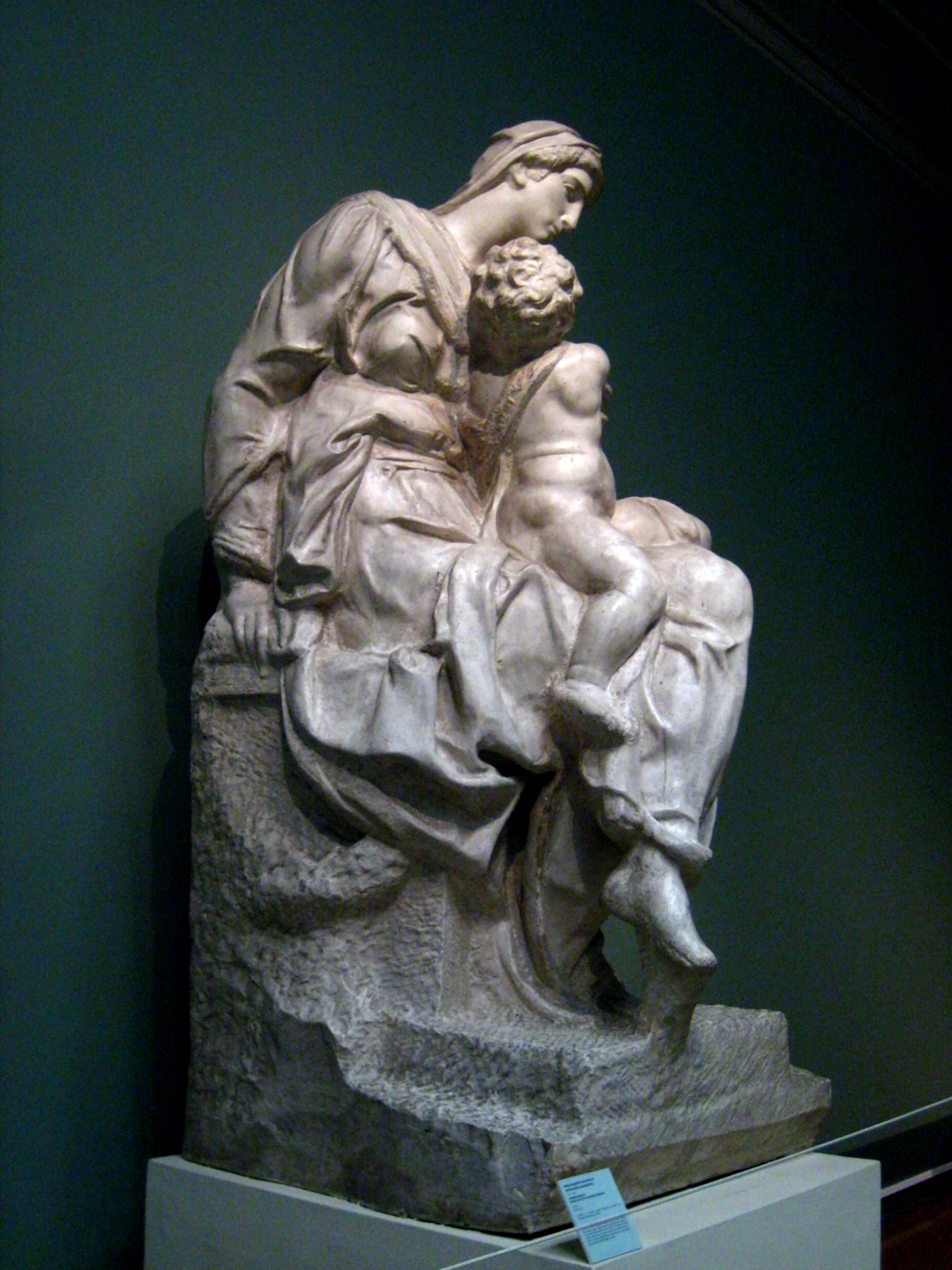 Michelangelo's Madonna Medici